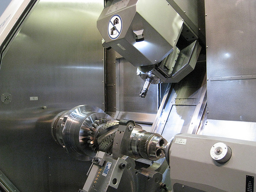 Kijkje in een eigentijds WFL draaifreescentrum (bron: Metaal Magazine)